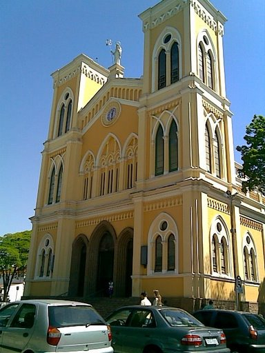 Praça Matriz São José de Mogi Mirim - SP